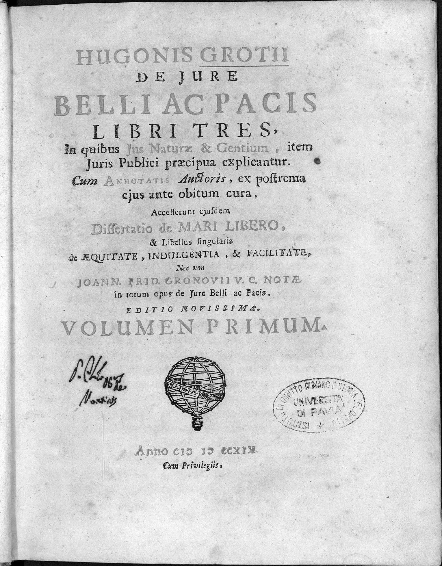 Frontespizio